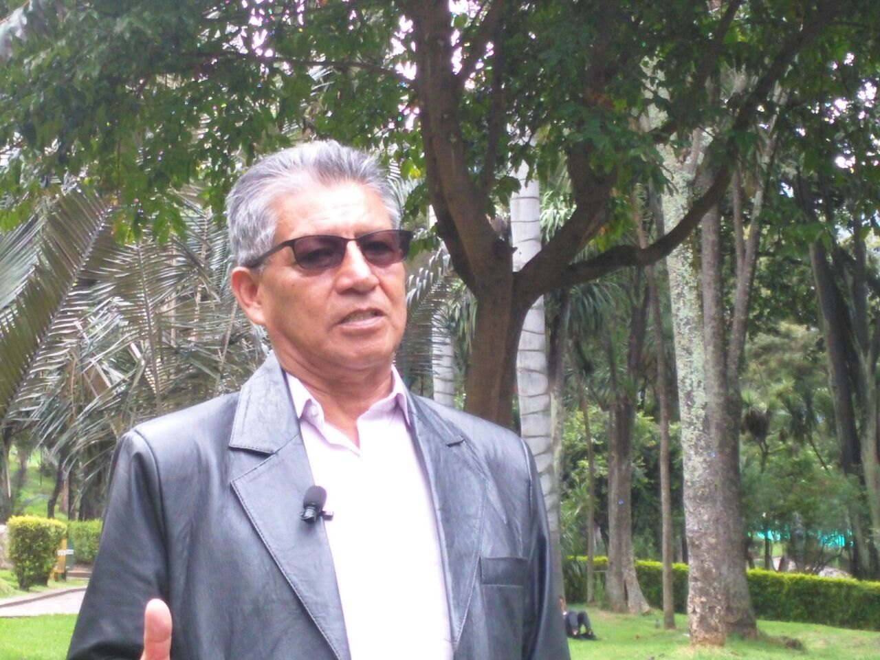 Marco Anibal Avirama Avirama